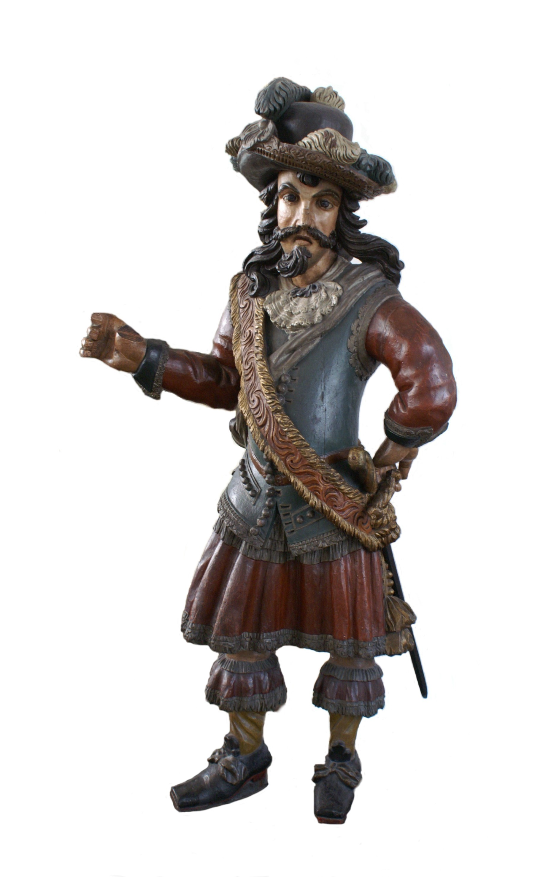 Heckfigur des Hamburger Konvoischiffes Admiralität von Hamburg, Bildhauer Christian Precht, 1691/92